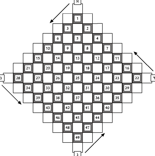 A Crossword pesipas in Hebrew